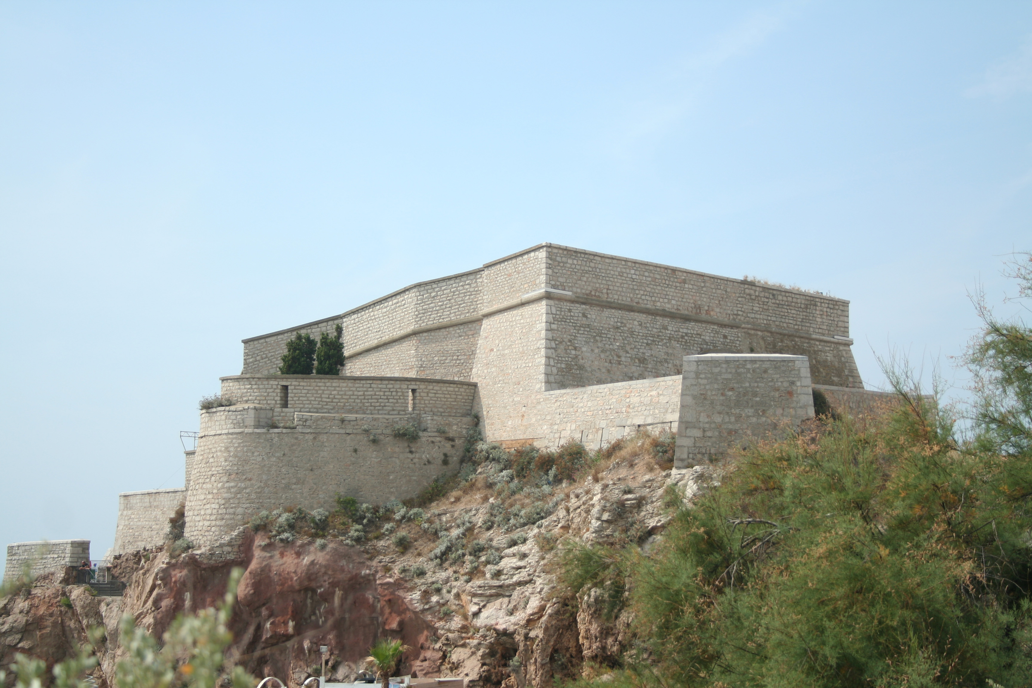 Sète (Hérault) - fort Saint-Pierre (1710-1711) construit par Antoine Niquet, aujourd'hui transformé en théâtre de la Mer.